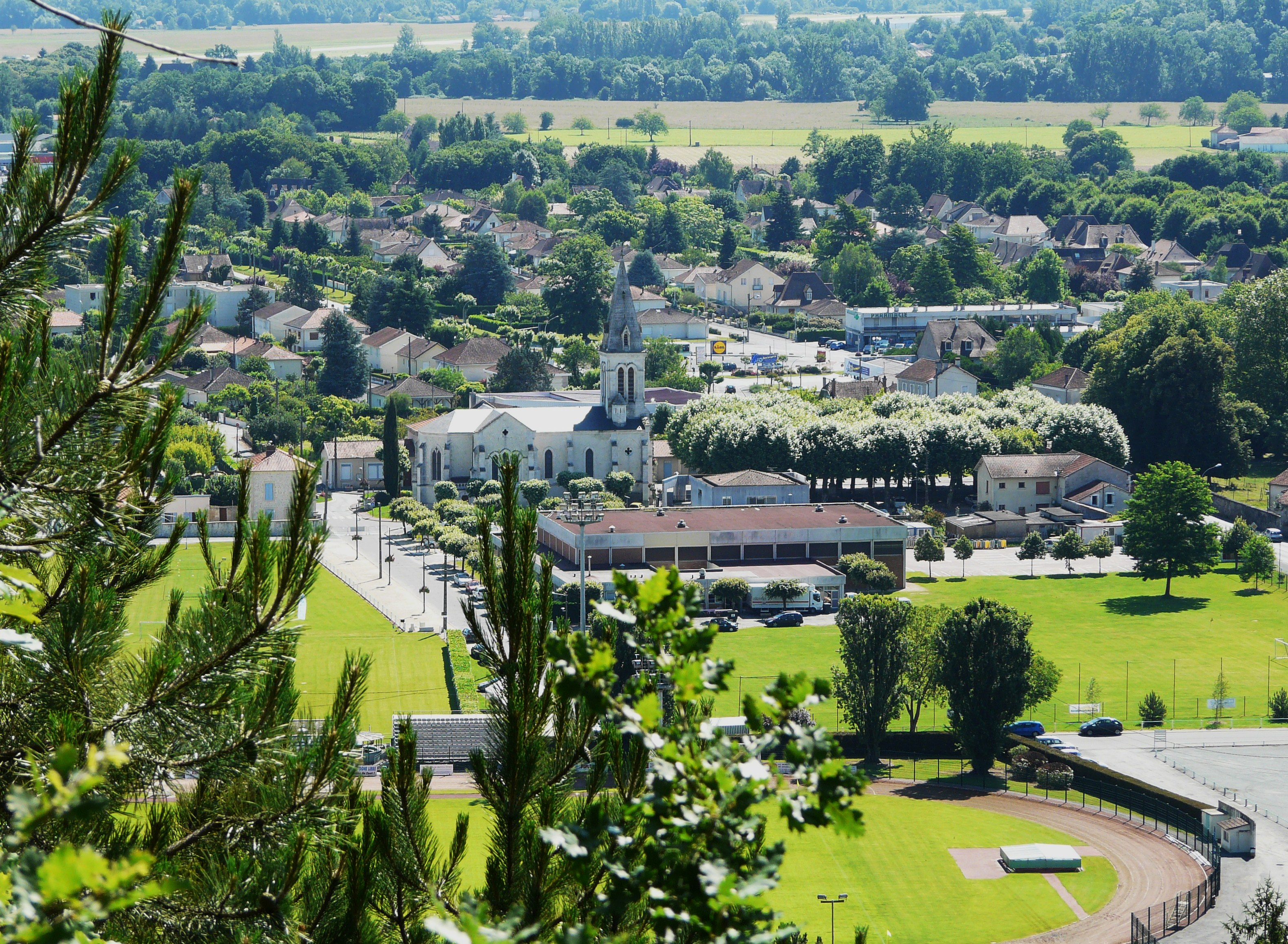 Vue générale du bourg de Trélissac